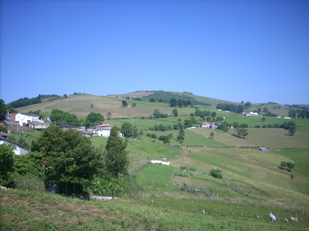 Visión de tierras de fastias